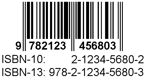 Nouvelle présentation du code ISBN à 13 positions dès le 1er janvier 2007. Source: je suis l'auteur de cette image. PhilFree 11 octobre 2006 à 15:17 (CEST)